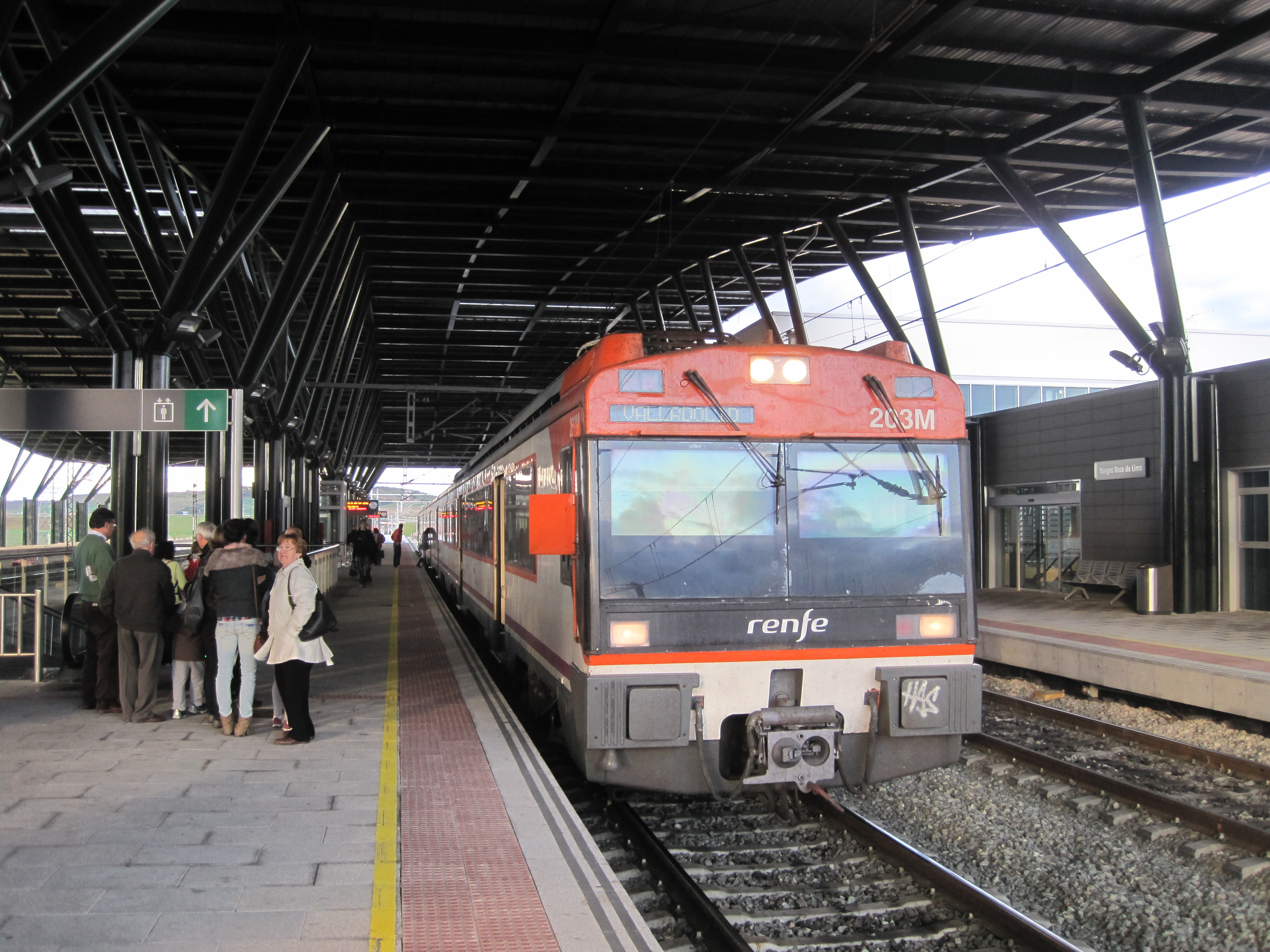 Regional Express procedente de Miranda de Ebro, a su paso por Burgos.